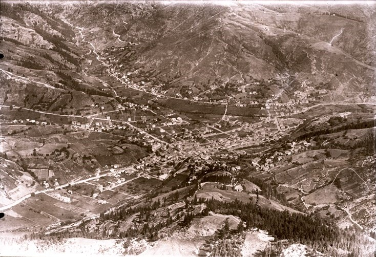 Общ изглед от Чепеларе, 1930 г.